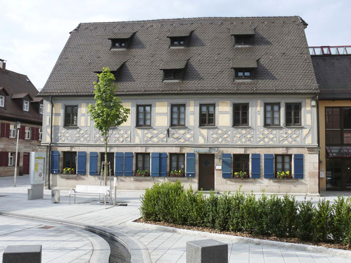 Städtisches Museum Zirndorf, Spitalstr. 2, 90513 Zirndorf